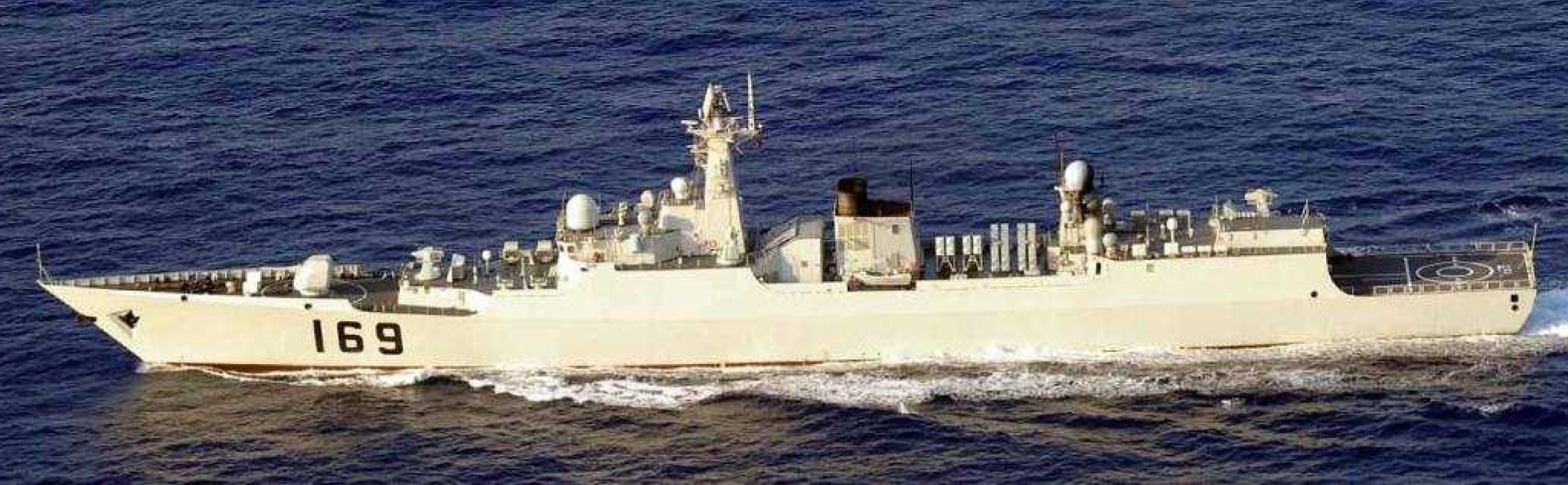 ５月６日（日）午前６時頃、海上自衛隊第５航空群（那覇）所属「Ｐ－３Ｃ」が、沖縄本島の南西約６５０ｋｍの海域を太平洋に向けて南東進する中国海軍のルーヤンI級ミサイル駆逐艦２隻、ジャンカイII級フリゲート２隻及びユージャオ級揚陸艦１隻の合計５隻を確認した。 このうち、ルーヤンI級ミサイル駆逐艦及びユージャオ級揚陸艦は、海上自衛隊において初めて確認したものである。また、沖縄本島南西約６１０ｋｍの海域において艦載ヘリコプターの飛行及び陣形運動を行っていたことが確認されている。